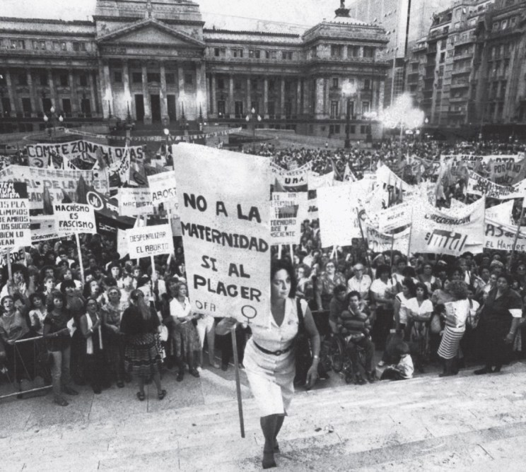 María Elena Oddone, adalid del movimiento feminista argentino de los años 70, subiendo las escaleras del Monumento de los Dos Congresos durante la primera manifestación del Día Internacional de la Mujer hecha en democracia. Su pancarta, que dice "No a la maternidad, sí al placer", escandalizó a la prensa y fue criticado dentro del mismo movimiento.